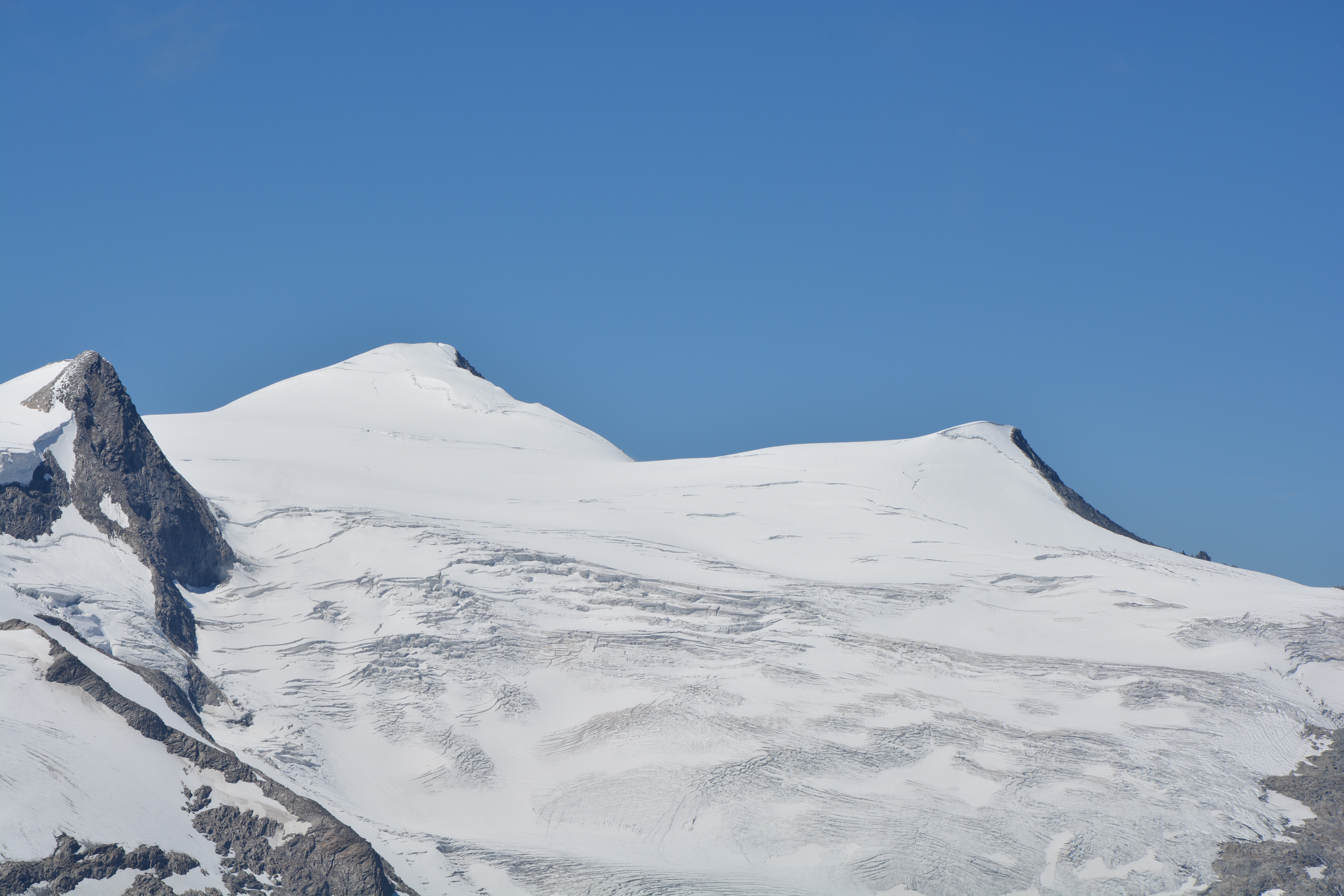 Groß- und Kleinvenediger gesehen vom Wildenkogel.